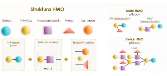 Upraveno dle: Bode L, Jantscher-Krenn E. Structure-Function Relationships of Human Milk Oligosaccharides. Adv. Nutr. 2012; 3: 383S–391S.